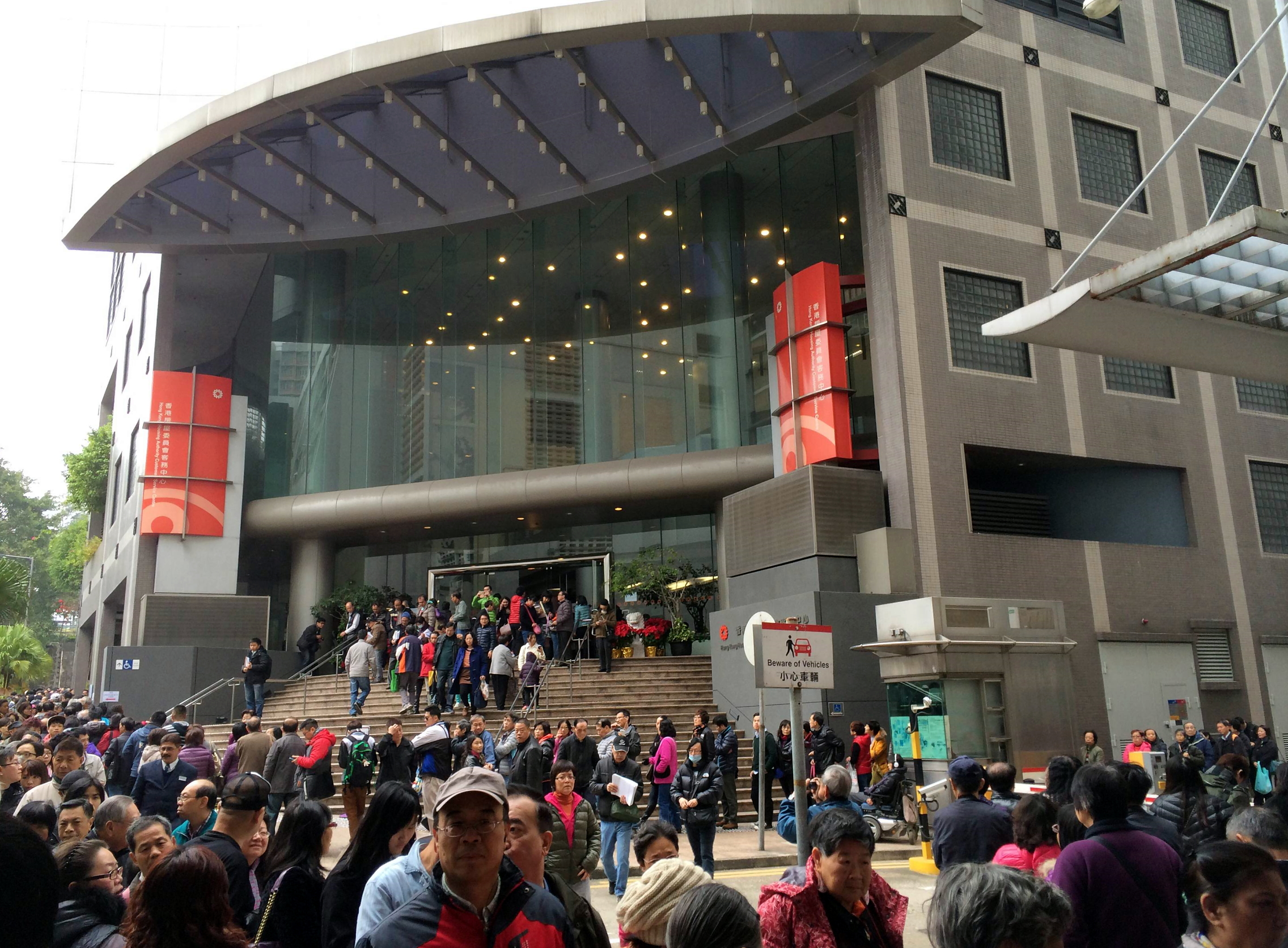 Home Ownership Scheme 2014 Queue in Lok Fu